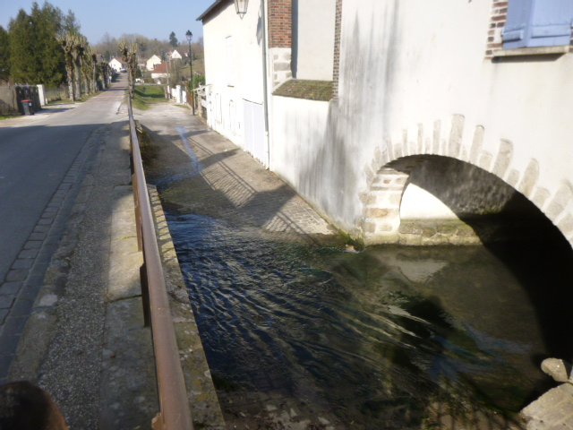 Courtenay, Loiret, Gâtinais, France. La rue des Ponts, empruntée par le GR 132, passe la Cléry. Le lavoir communal est juste de l'autre côté de la route. Vue vers le nord-ouest.